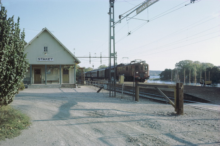 Stäkets järnvägsstation på Västeråsbanan, Järfälla kommun, 1960-talet.